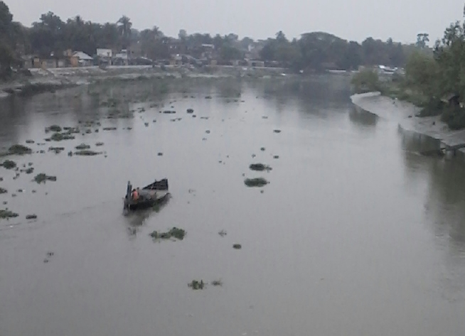 Bidyadhari river, Haroa, Basirhat, North 24 Parganas, West Bengal, India